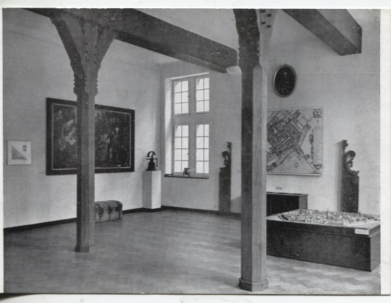 Innenansicht des Kornhauses